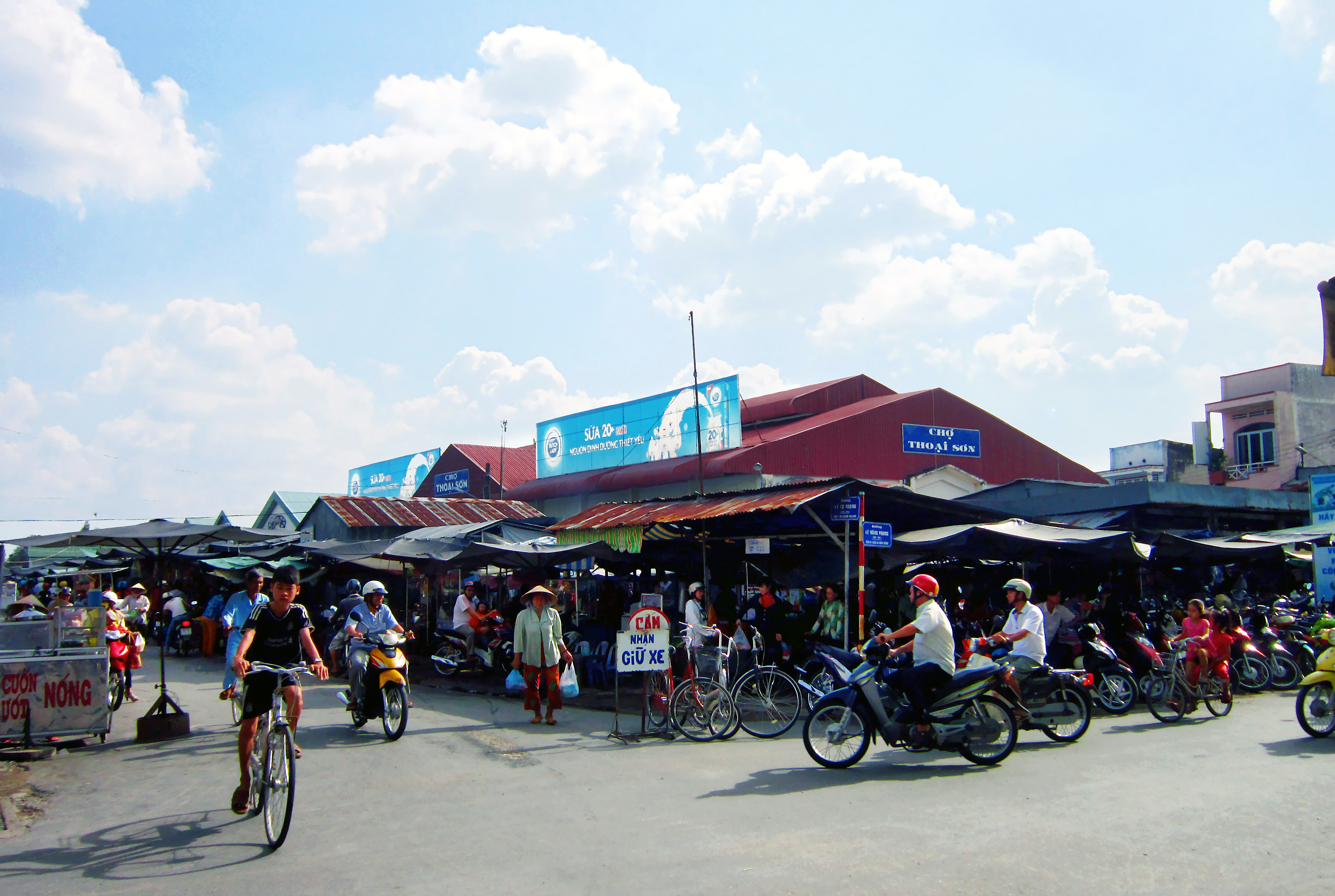 Chợ Thoại Sơn ở thị trấn Núi Sập, huyện Thoại Sơn, An Giang, Việt Nam.